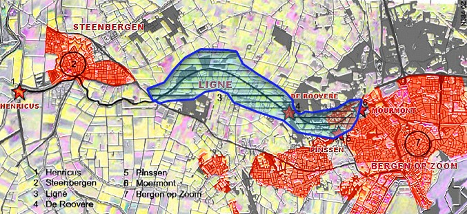 West-Brabantse waterlinie (later: Stelling West Noord-Brabant) Voor de achtergrond gebruikt de satelietfoto: Bron NLR en ESA. Kleuropmaak Ed Stevenhagen Oorspronkelijk kaart: zwartwit: Jhnijman (132259 bytes) met vermelding: "ik heb dit plaatje zelf gemaakt mbv Alterra Wageningen tbv een artikel in een tijdschrift (Landscape and Urban Planning 2005) van Elsevier". Vrij te gebruiken met Bronvermelding: NLR/Esa Alterra